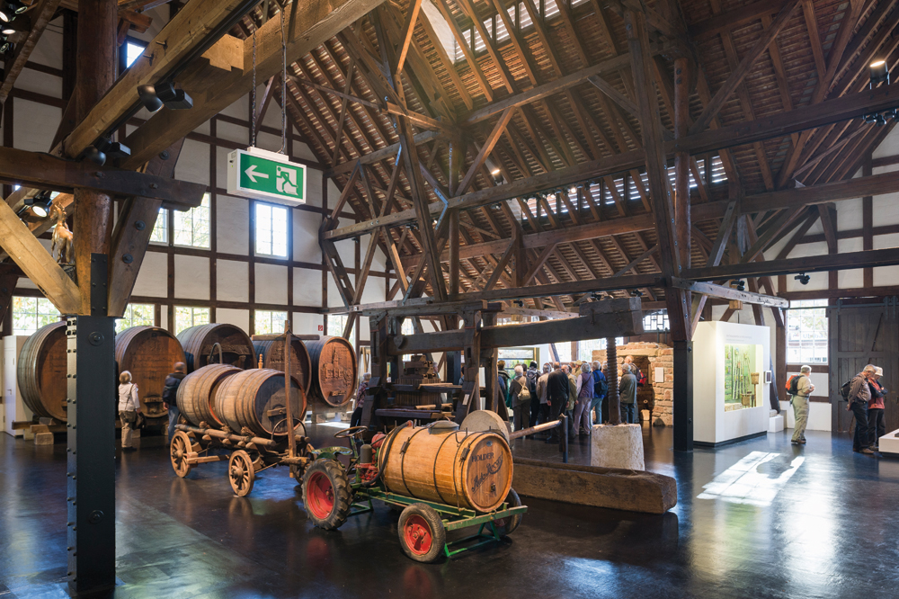 Das Weinbaumuseum Stuttgart innen